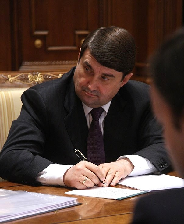 Министр транспорта на совещании по вопросам строительства объектов транспортной инфраструктуры.